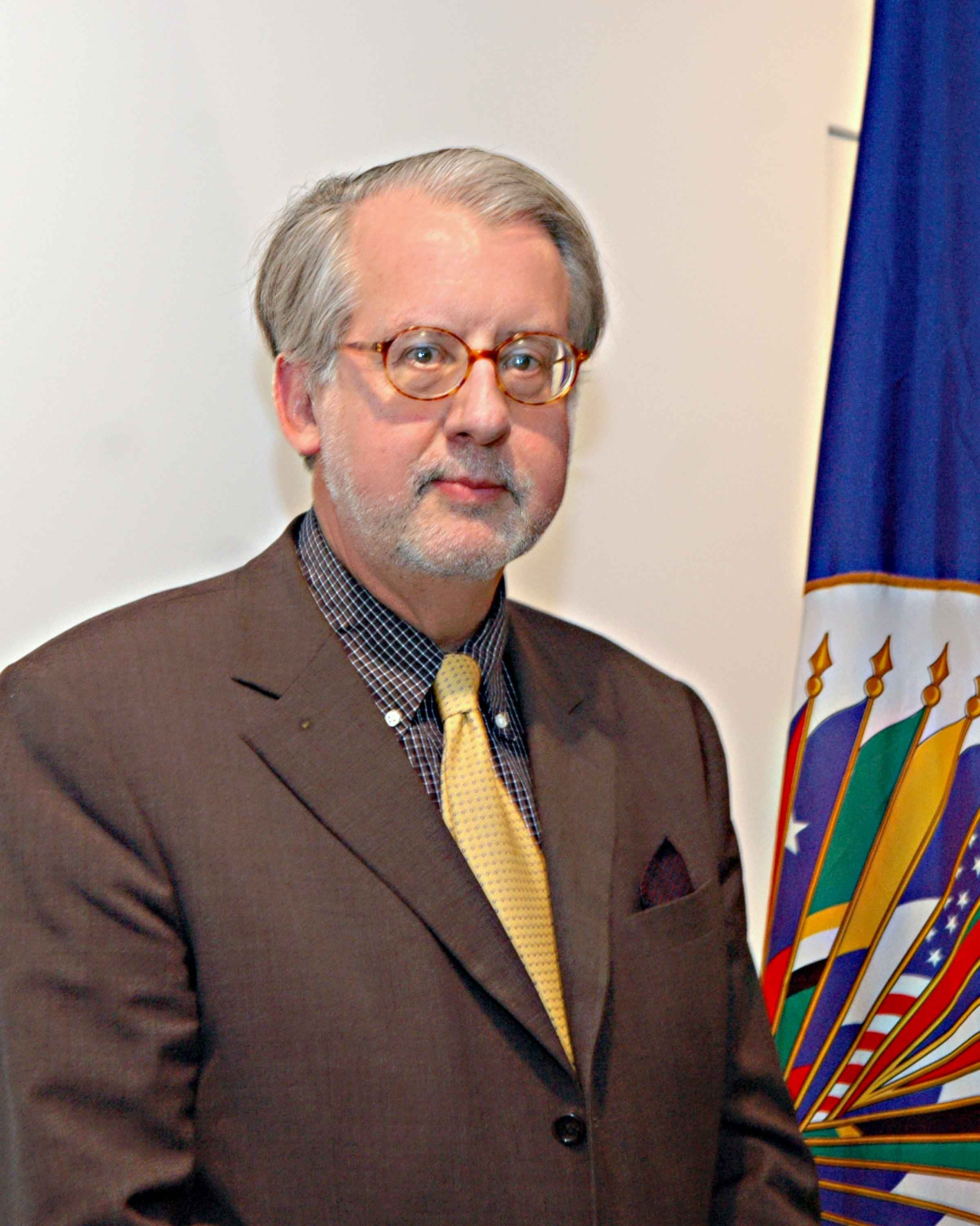 Paulo Sérgio Pinheiro fue elegido por la Asamblea General de la OEA celebrada en junio de 2003 e inició su mandato en la CIDH el 1 de enero de 2004. Fue reelegido en el 37º período ordinario de sesiones de la Asamblea General de la OEA, celebrada en junio de 2007, por un segundo período reglamentario de cuatro años, contados a partir del 1º de enero de 2008. Paulo Sérgio Pinheiro es profesor adjunto de relaciones internacionales en el Watson Institute de Brown University. Fue Relator Especial de las Naciones Unidas para Myanmar y para Burundi y fue nombrado por el Secretario General de la ONU como experto independiente para la elaboración del Estudio sobre la Violencia contra los Niños, presentado en 2006. Fue asimismo vicepresidente de la Comisión Internacional Humanitaria de Verificación en Berna, Suiza, y participó en misiones de observación de derechos humanos en Argentina, Chile, Haití, Perú, Paraguay, Togo y Timor Oriental, entre otros países. Ha dictado clases en diversas universidades, incluyendo Universidad de Sao Paulo en Brasil, Oxford en Gran Bretaña, Notre Dame y Columbia en Estados Unidos, y École des Hautes Études en Sciences Sociales en París, Francia. Ha publicado cientos de ensayos, artículos y libros sobre derechos humanos.